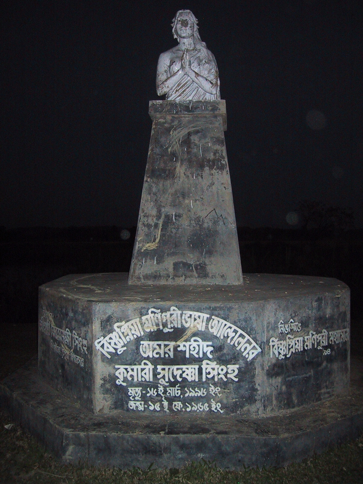 বিষ্ণুপ্রিয়া মণিপুরী: শহীদ সুদেষ্ণার শহীদবেদিগ